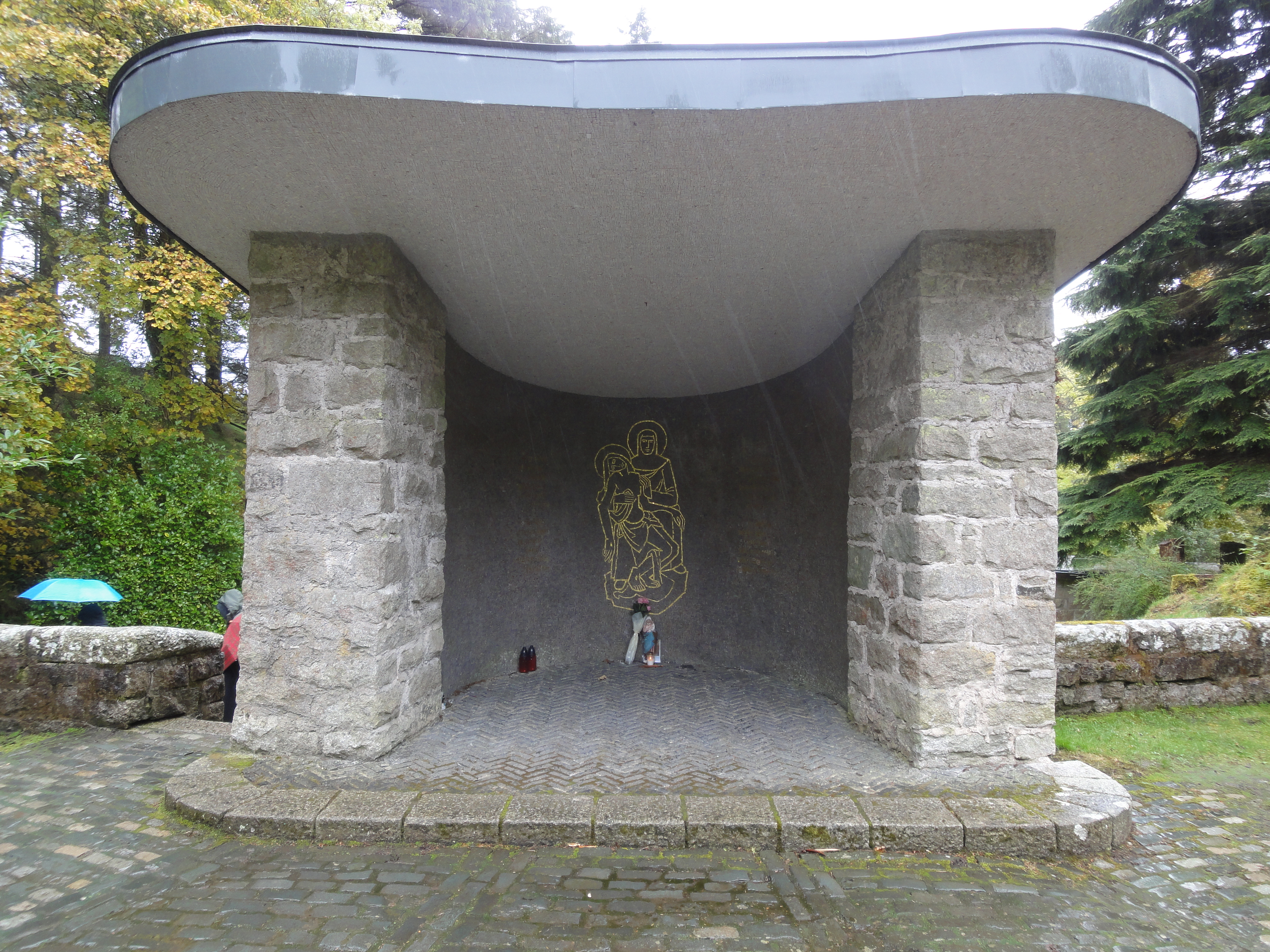 Soldatenfriedhof Glencree - Die Trauerhalle